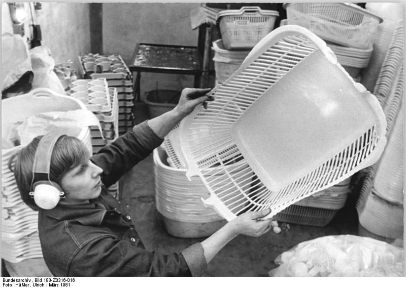 ADN-ZB-Häßler-16.3.81-Bez. Dresden: Aus alt mach neu -Bruch und technologisch bedingter "Abfall" aus Plast wird im VEB Preßwerk Ottendorf-Okrilla, einem Betrieb im Kombinat Elastverarbeitung Berlin, vollständig der Wiederverwendung zugeführt. Ilka Zeller prüft hier das mit betriebseigenen Anlagen zurückgewonnene Plastgranulat. Aus einer Tonne Plast können z.B. 449 Wannen (60 Liter) hergestellt werden. -Siehe auch Motiv Z 0316-17N-"